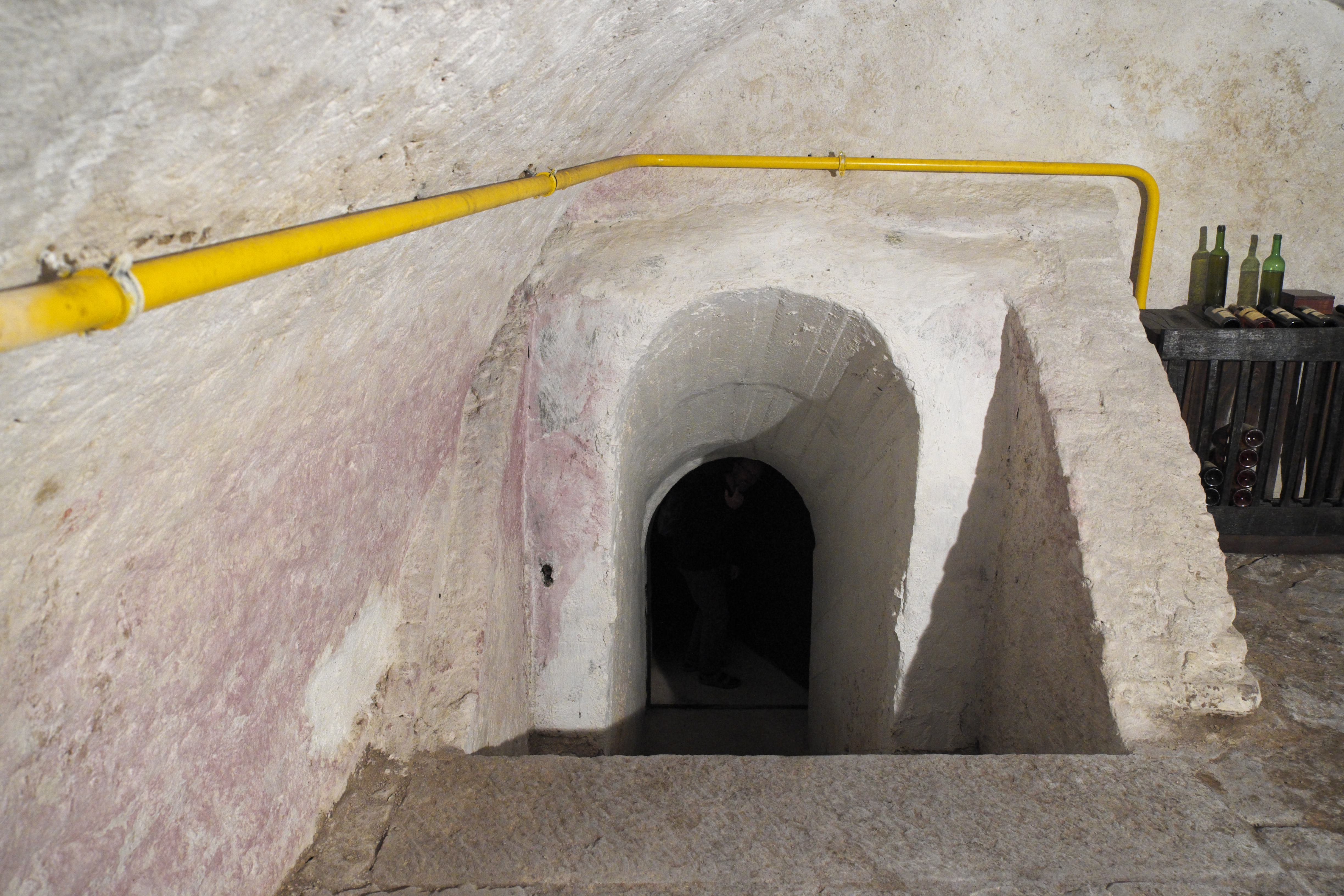 Gotischer Gewölbekeller des Chornitzer-Hauses in Telč im Kraj Vysočina (Tschechien)